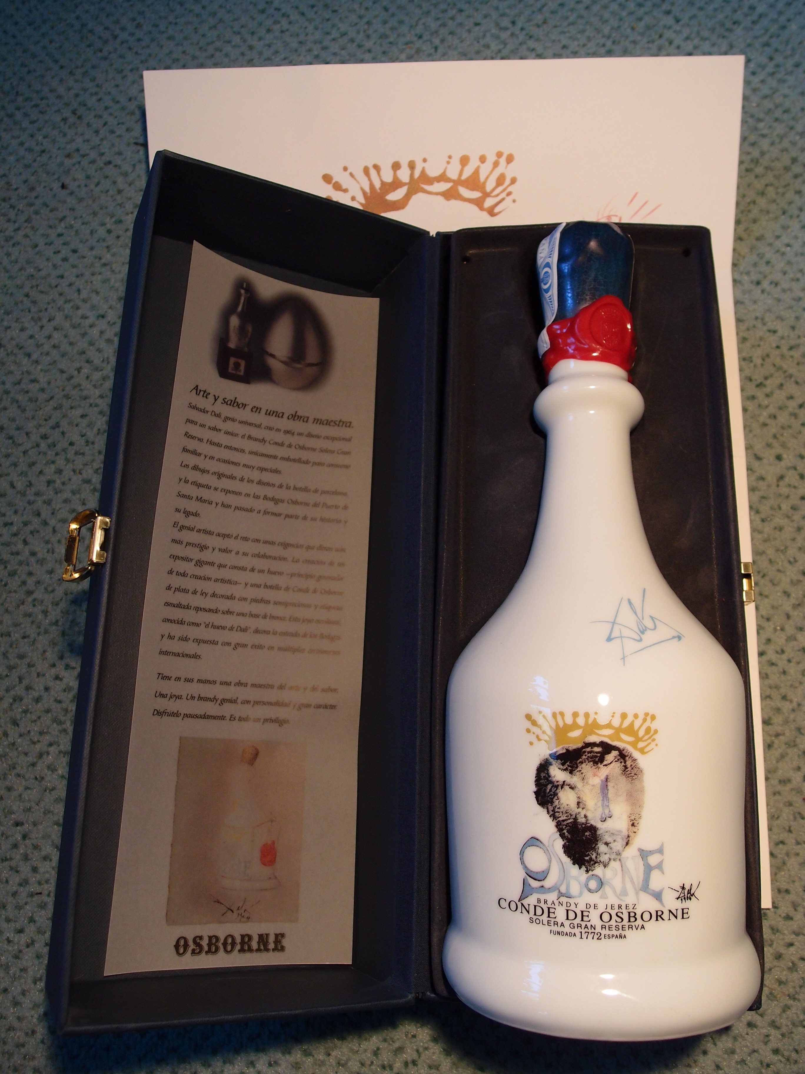 Brandy Conde de Osborne Dalí (Solera Gran Reserva) - in Originalverpackung Datum: 11.08.2011 Urheber: M. Pfeiffer alias Benutzer:Gordito1869 Quelle: privates Fotoarchiv des Urhebers